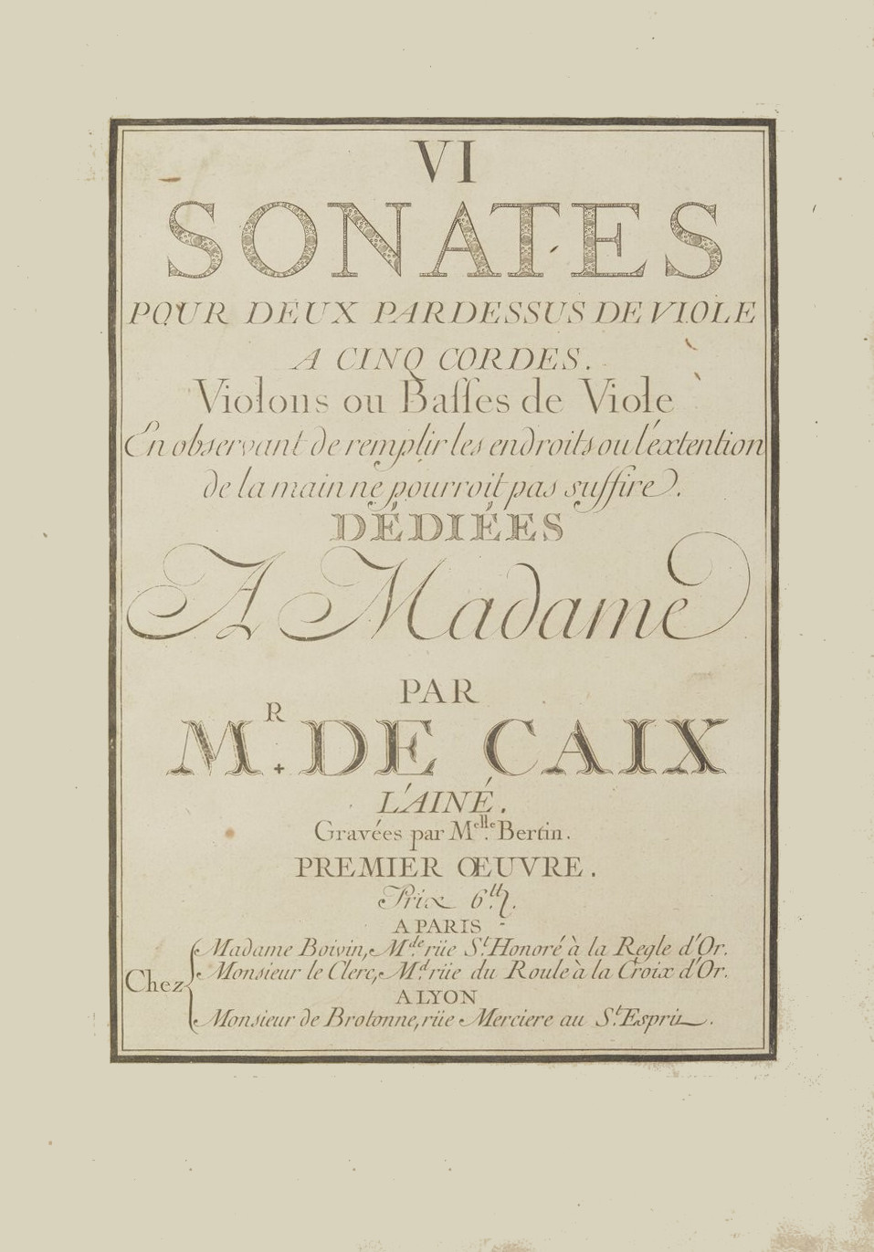 Page de titre des « 6 Sonates pour 2 pardessus de viole, op. 1 » de Barthélemy de Caix, édité vers 1750.